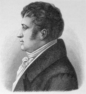 Portrait of August Wilhelm von Schlegel